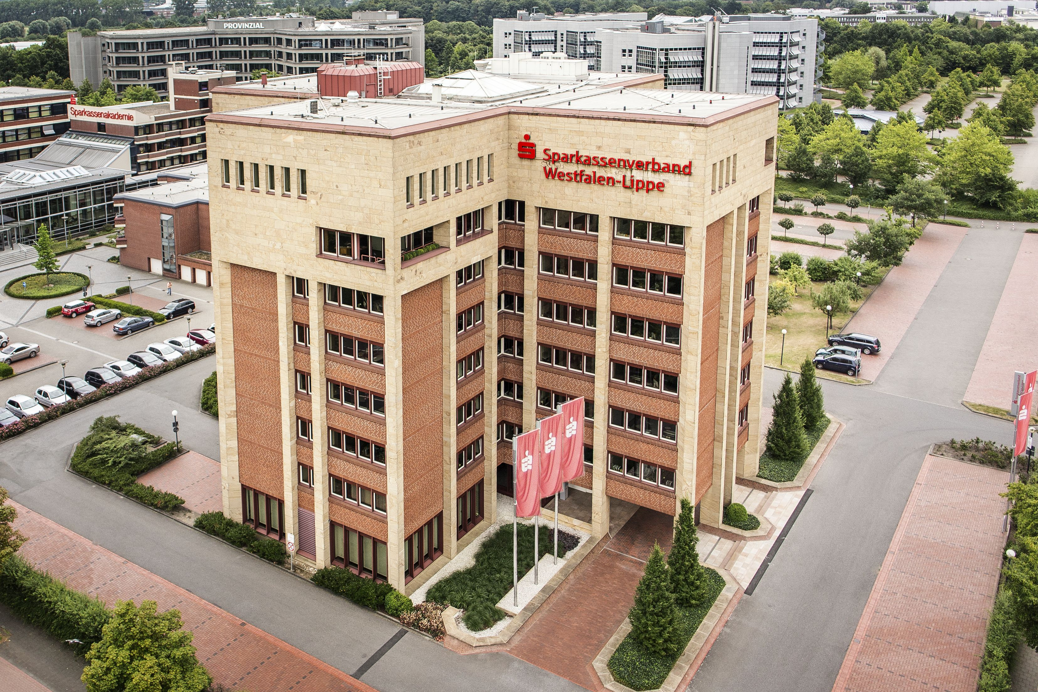 Der Sitz des SVWL in Münster-Kinderhaus